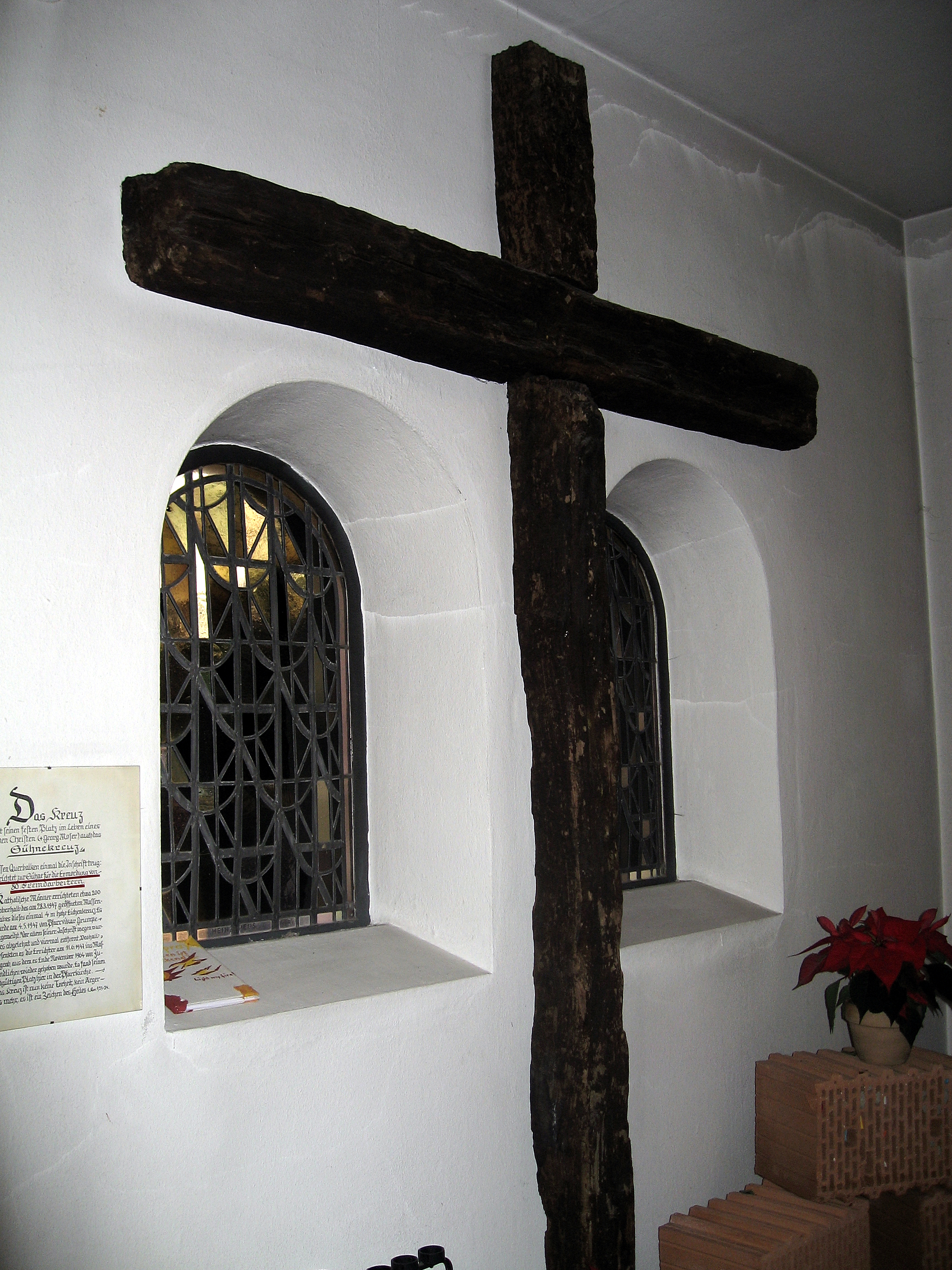 Meschede, Mariä Himmelfahrt, Sühnekreuz in der Seitenkapelle